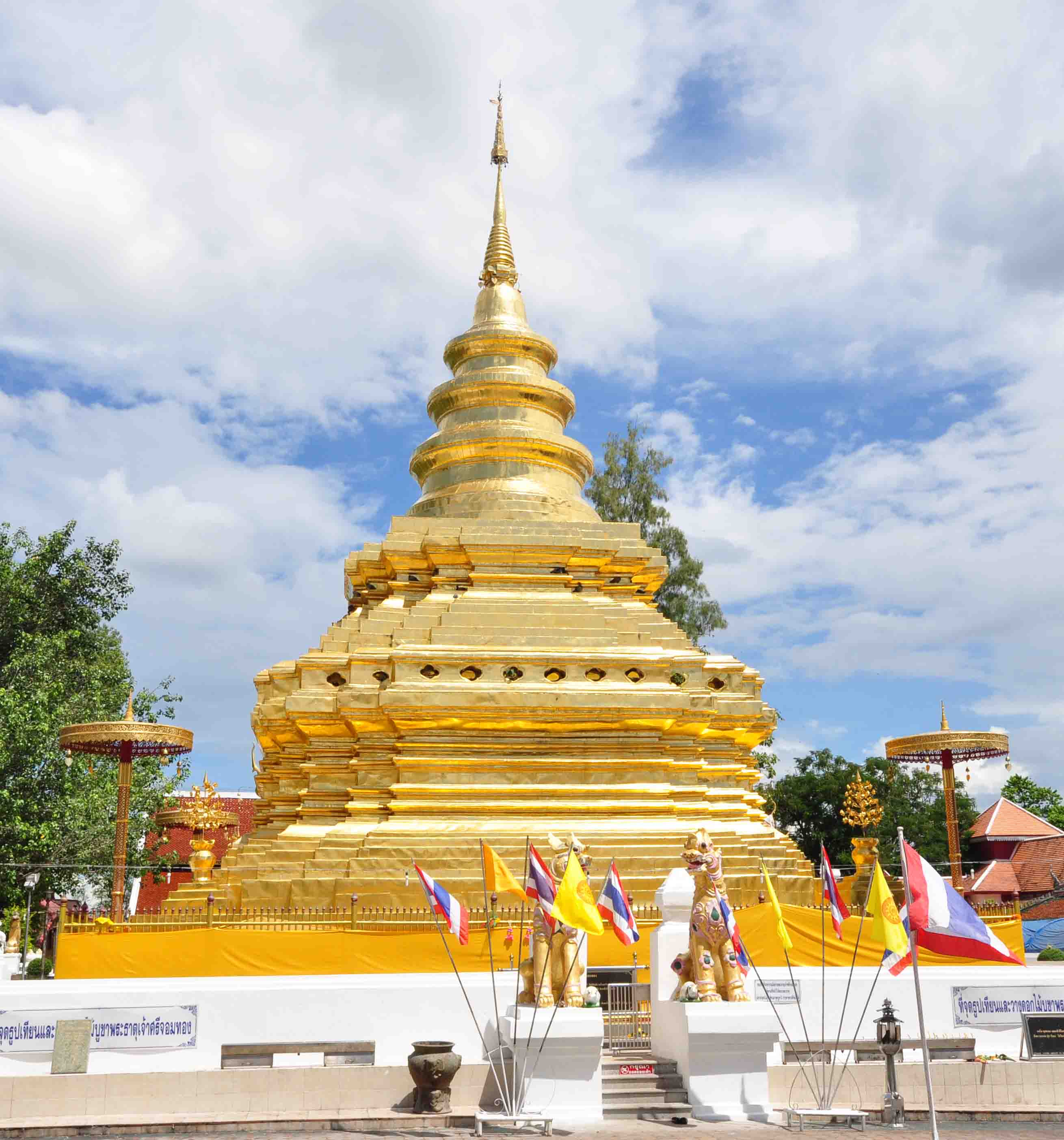 จอมทอง